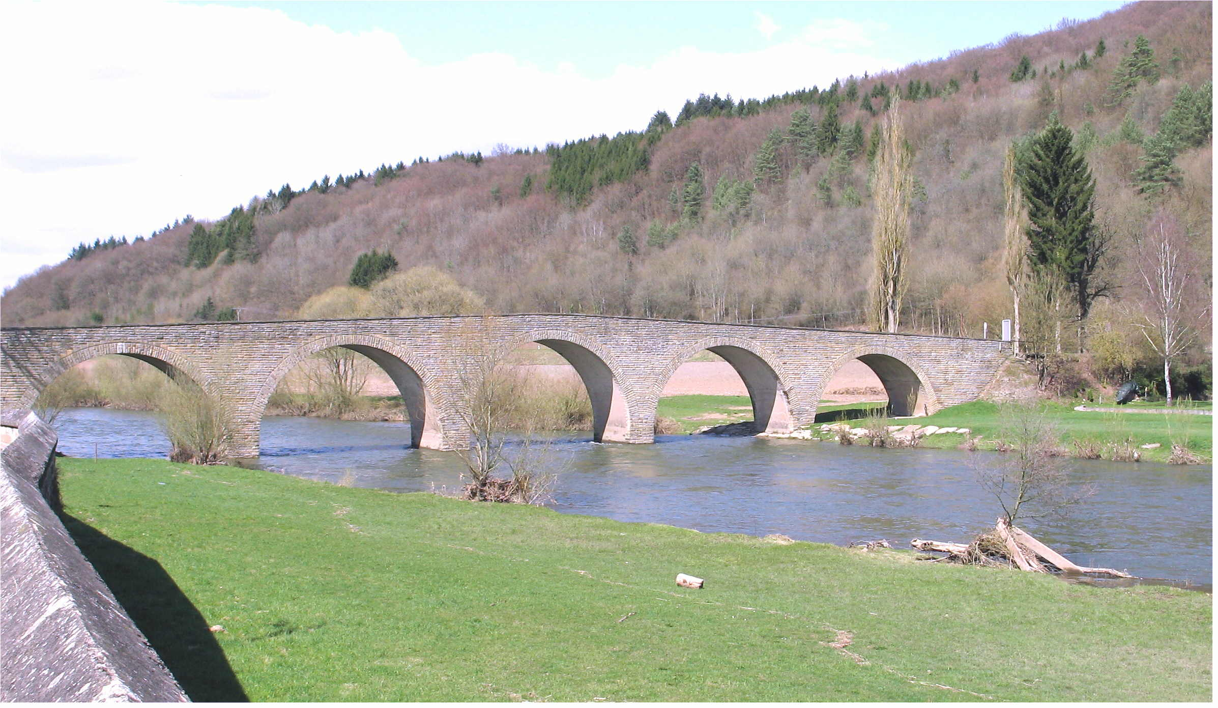 Sujet : D'Sauerbrëck zu Déiljen Source : Eege Foto Johnny Chicago (Abrëll 2006) Lizenz : Deilgen Deilgen Deilgen Deilgen Deilgen Bréck Deilgen